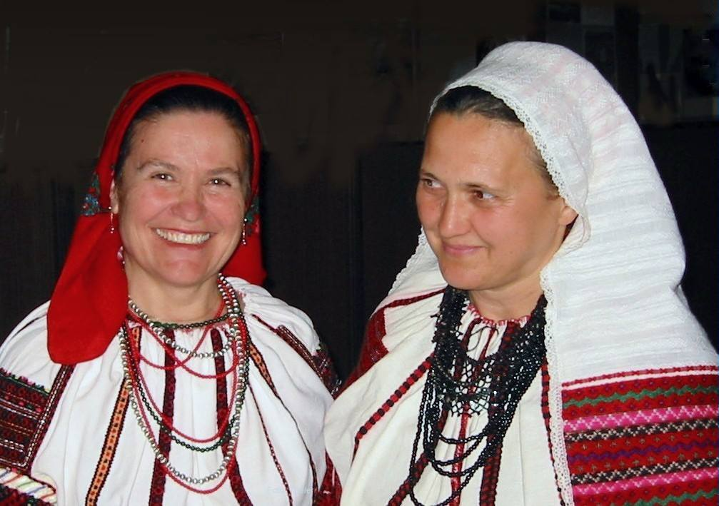 A moldvai csángó magyarok "nagykövetei". Nyisztor Ilona (tanító, énekes) és Petrás Mária (keramikus, énekes), 2004-ben.